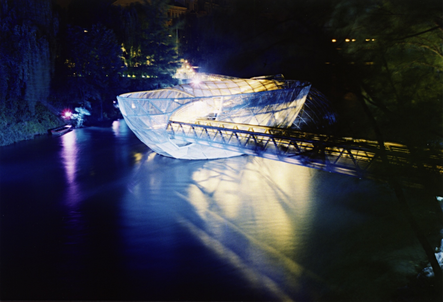 Murinsel in Graz. Langzeitbelichtete Nachtaufnahme.